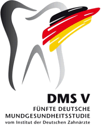 Logo der DMS V